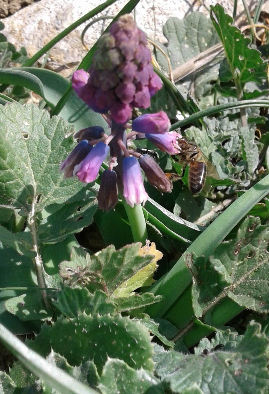 نحلة تلياني ترعى على نبتة بصلة الذئب